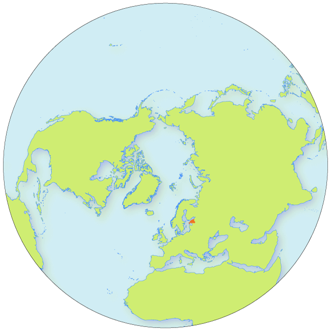 Põhjapoolkera Lamberti asimutaalses võrdpindses projektsioonis; kaardi keskpunkt on põhjapoolus, ringjoonekujuline serv on ekvaator. Eesti on märgitud punasega.